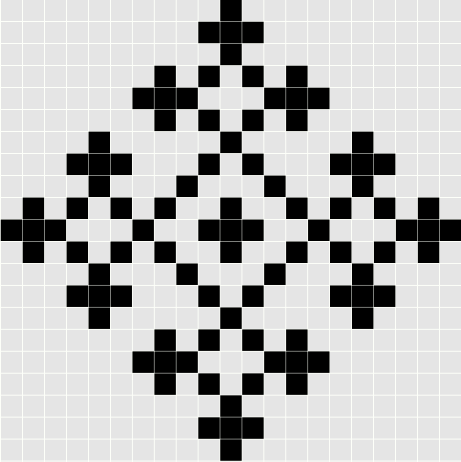 Motif tricot norvégien, taelvhoernigsrosa